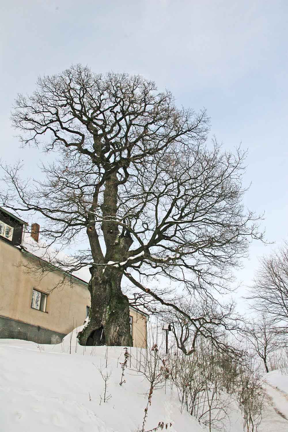 Žižkův dub u obce Podhradí pod hradem Lichnice